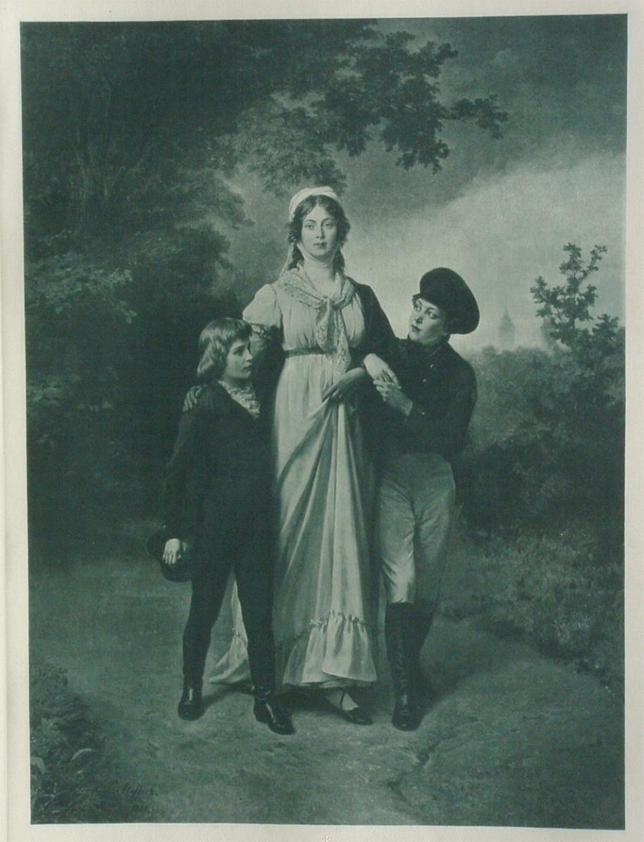 Luise von Mecklenburg-Strelitz mit ihrem beiden Söhnen:Friedrich Wilhelm IV. und Wilhelm I. in Luisenwahl von Carl Steffeck